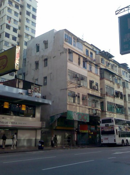 Ma Tau Wai Road 45J Building 馬頭圍道45J號唐樓